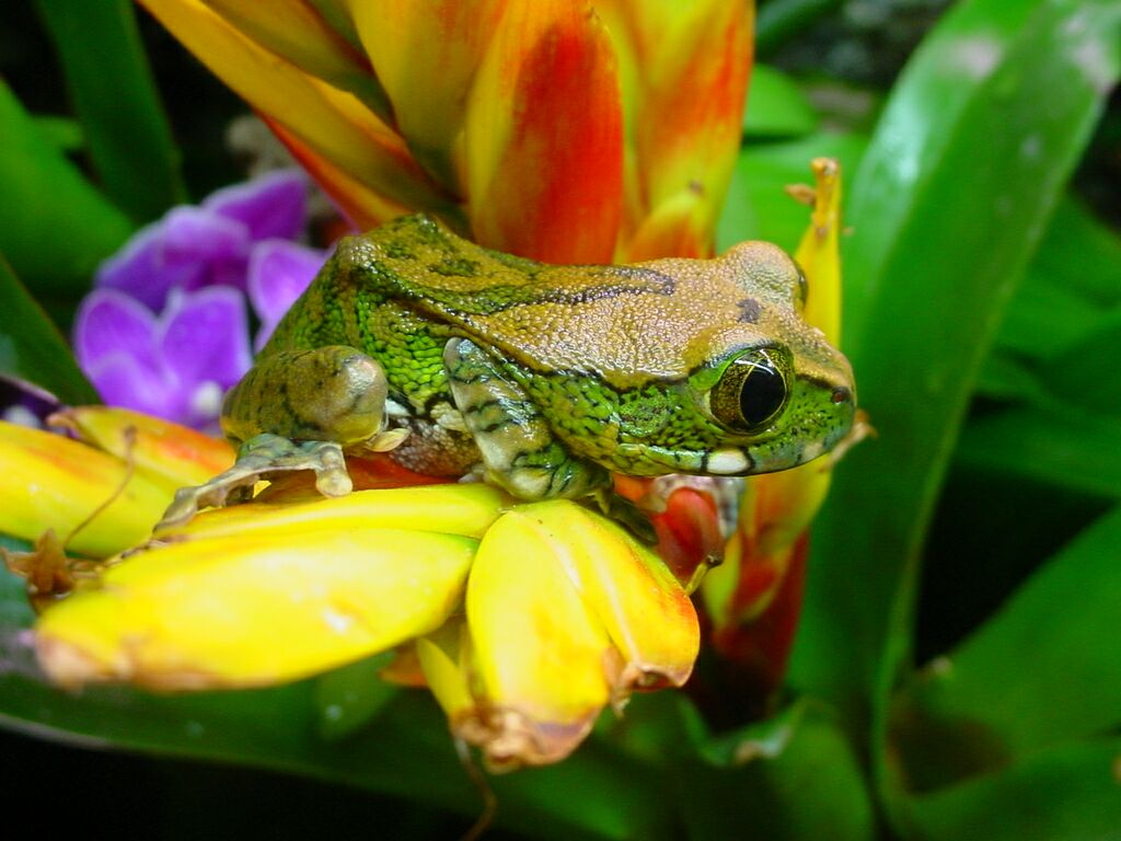 Grüner Waldsteigerfrosch, auch Juwelenlaubfrosch oder Blaufußwaldsteigerfrosch genannt (Leptopelis vermiculatus), männlich, semiadult, Terrarienaufnahme. Big-eyed Tree Frog (Leptopelis vermiculatus), male, semiadult.